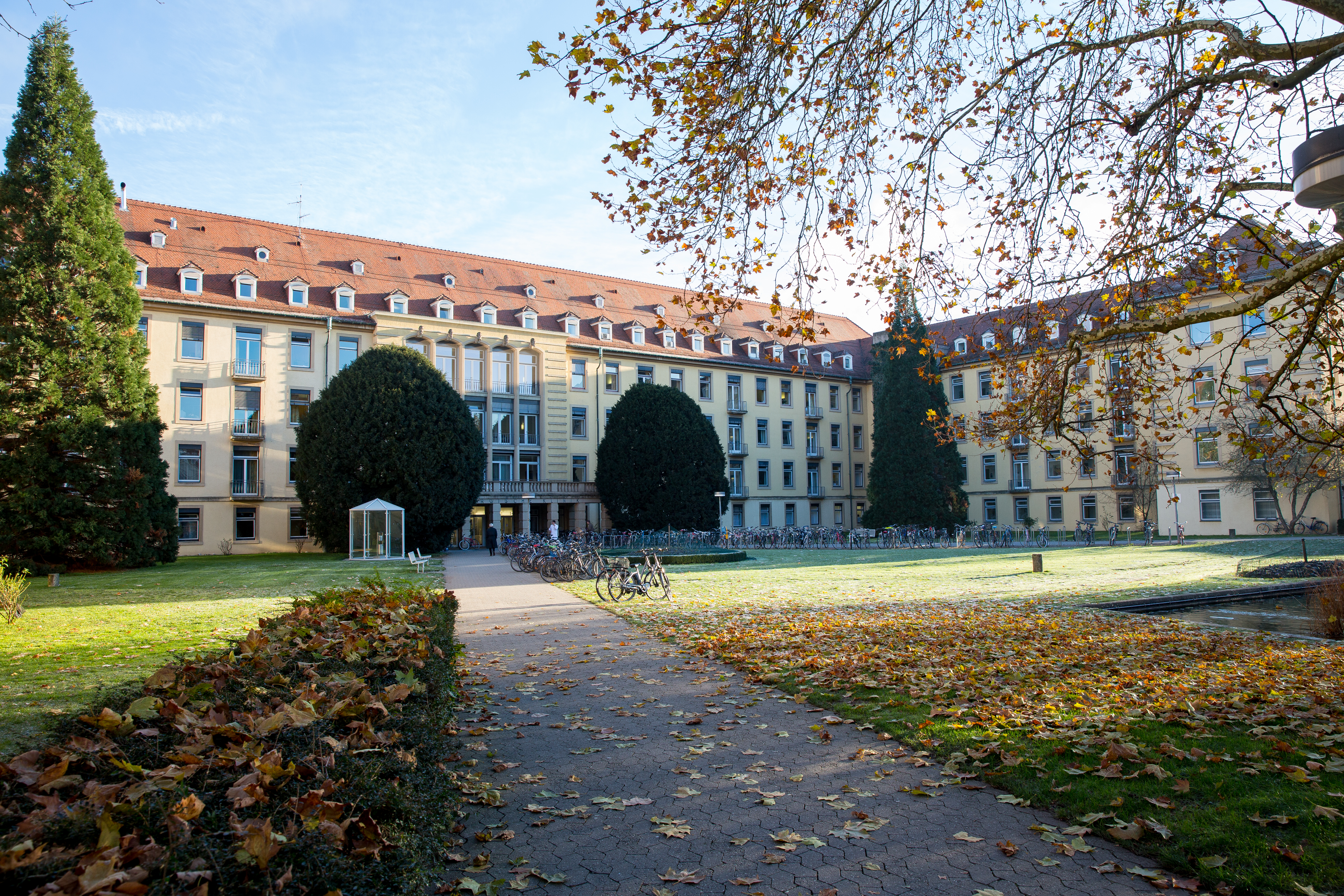 Chirurgische Klinik am Universitätsklinikum Freiburg